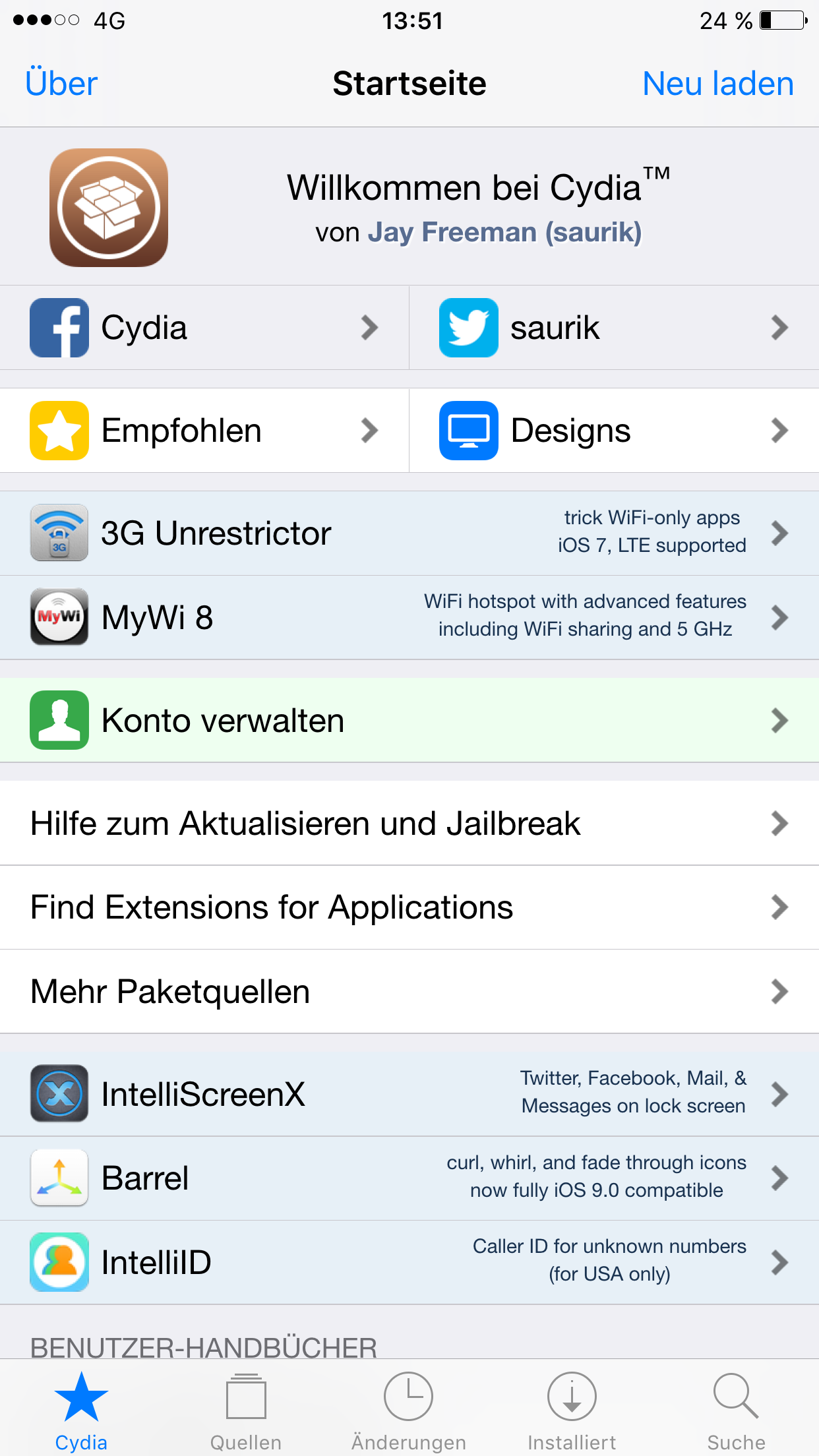 Screenshot der deutschen Startseite der freien und öffentlichen Paketdownloadsoftware Cydia von Jay Freeman "saurik".